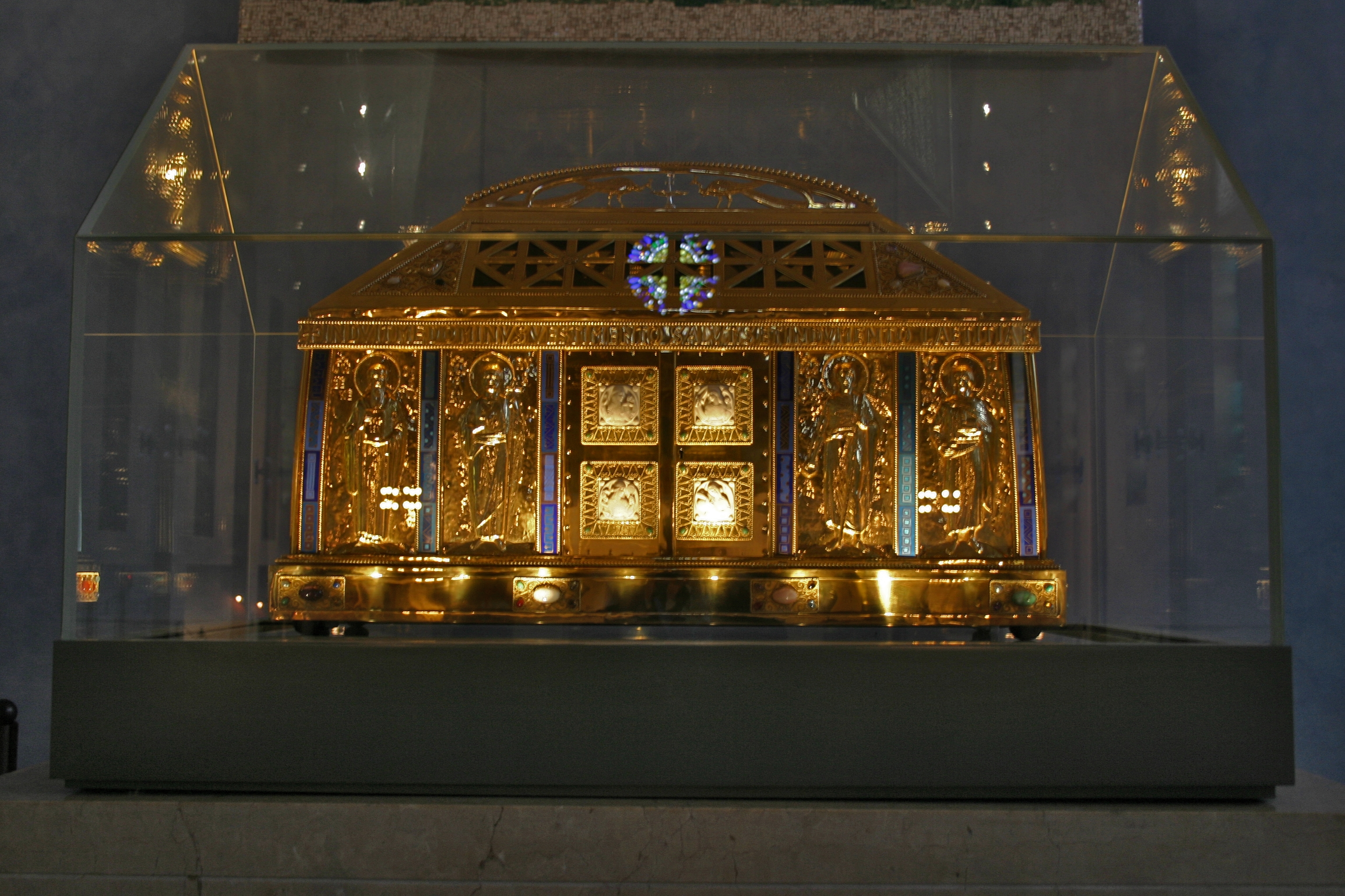 Hildegardisschrein (1929) in der Pfarrkirche von Eibingen